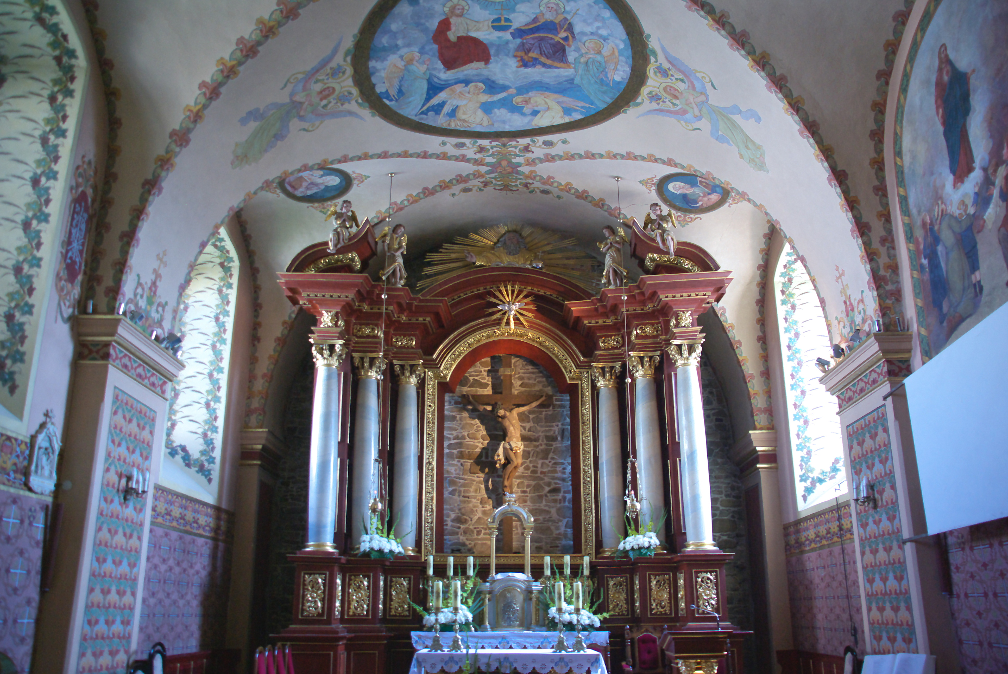 Ołtarz kościół oo. Franciszkanów Sanok